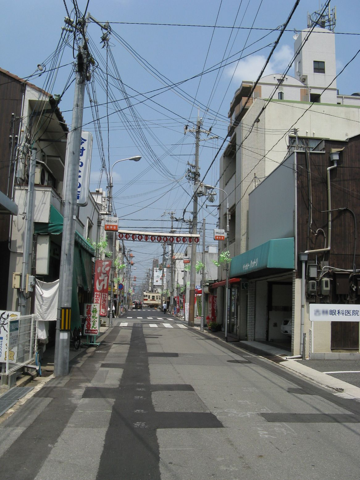 旧飾磨街道 飾磨駅南側界隈